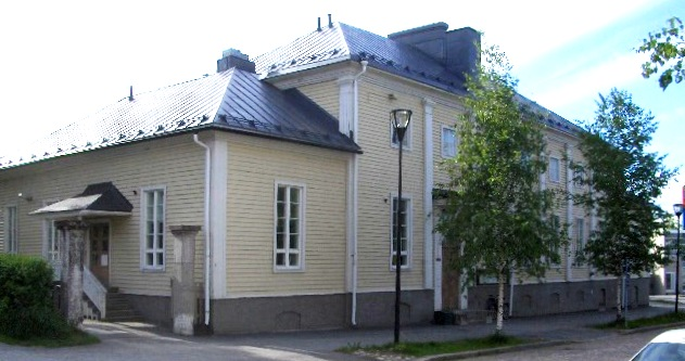 Entinen suojeluskuntatalo, nykyinen teatterin pieni näyttämö